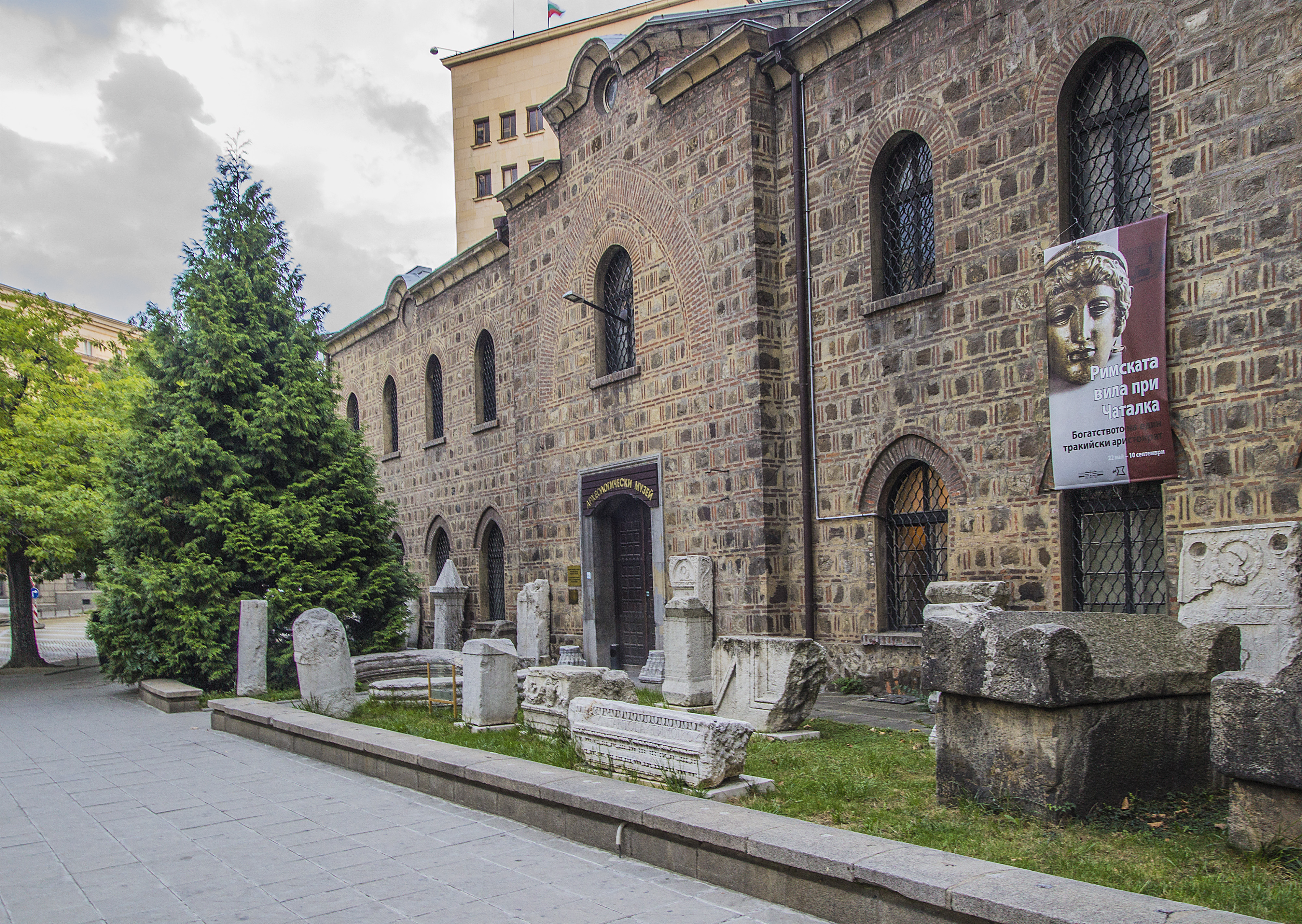 Централното историческо ядро на София